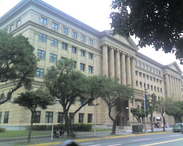 司法第二辦公大廈，由臺灣高等法院民事庭（位於面對該建築的右半部）、法務部第二辦公室及最高檢察署（位於左半部）合署辦公。